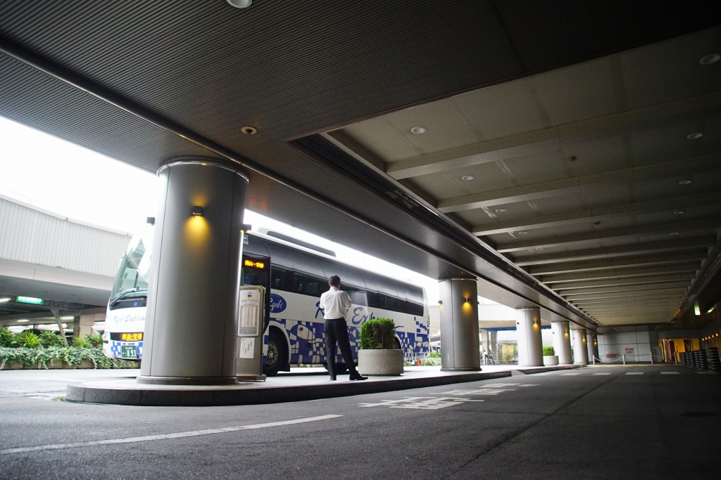 南海なんば高速バスターミナルです